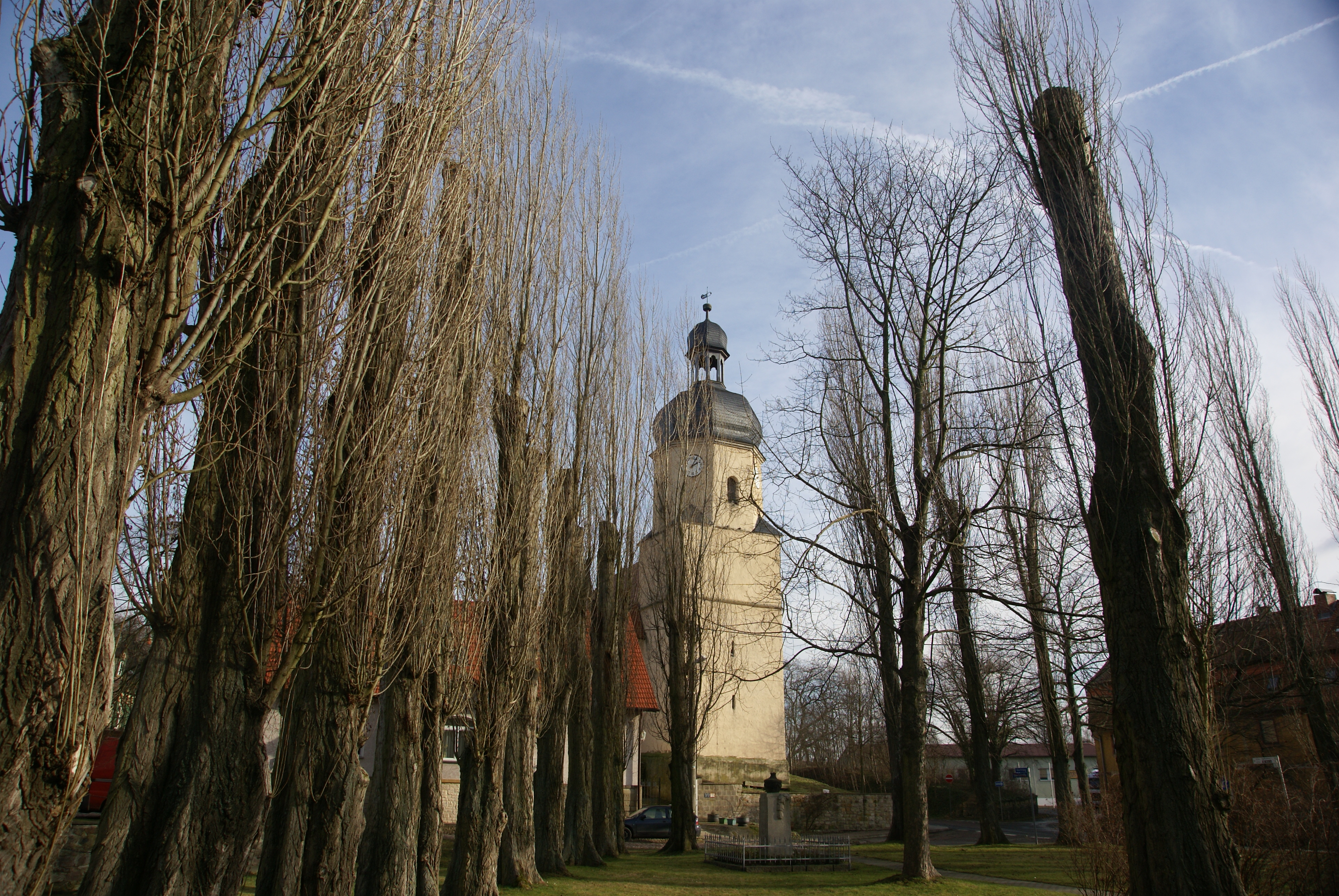 Blick durch Pappeln auf den Turm der Dorfkirche Fienstedt